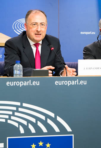 José Manuel Fernandes, Conferência de Imprensa após o voto do Fundo Europeu de Investimentos Estratégicos no Parlamento Europeu